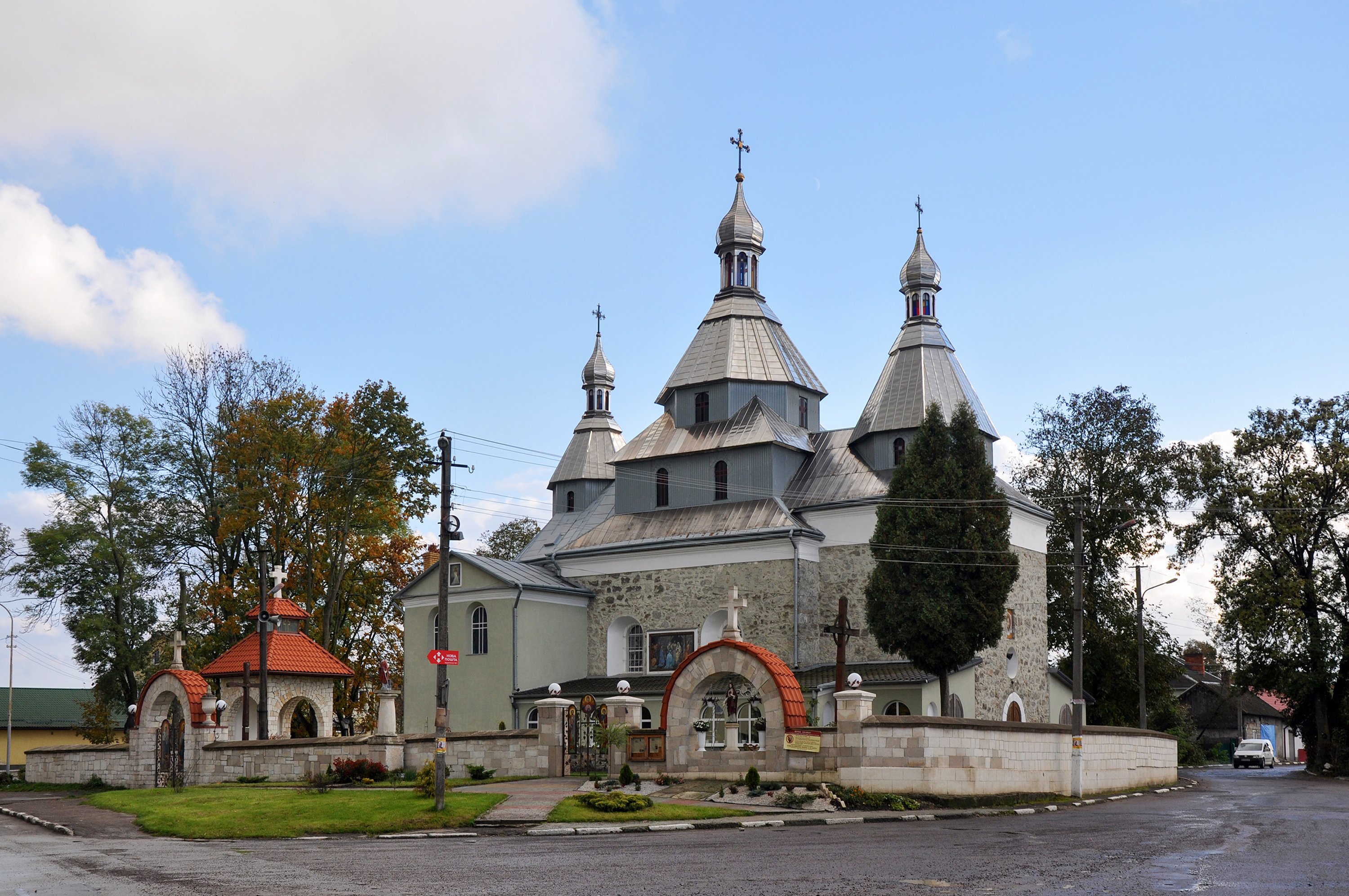 Церква Пресвятої Трійці (мур.), смт.Щирець